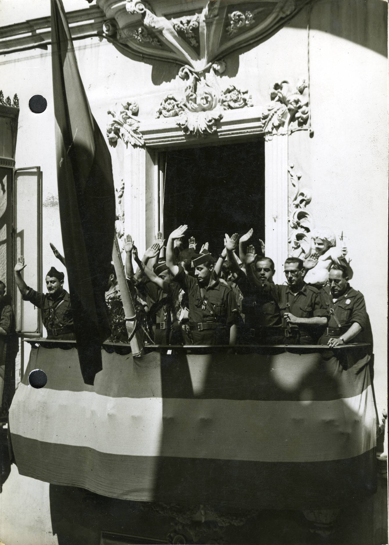 Fotografía del Jefe Territorial de la Falange Española Sancho Dávila y Fernández de Celis en Sevilla saludando desde el balcón de la casa cuartel de la calle Rioja. Sevilla, 29/09/1936